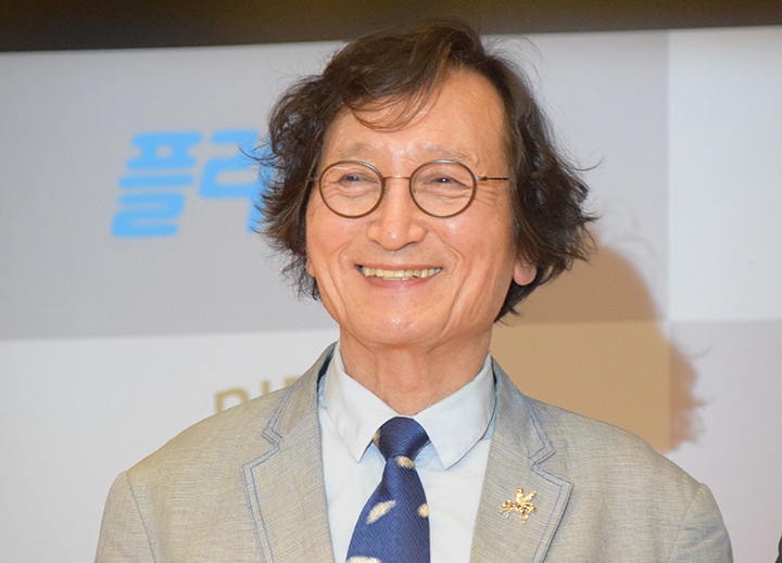 2019년 제23회 BIFAN 개최관련 기자회견장에서의 정지영 감독 (2019.5.30)